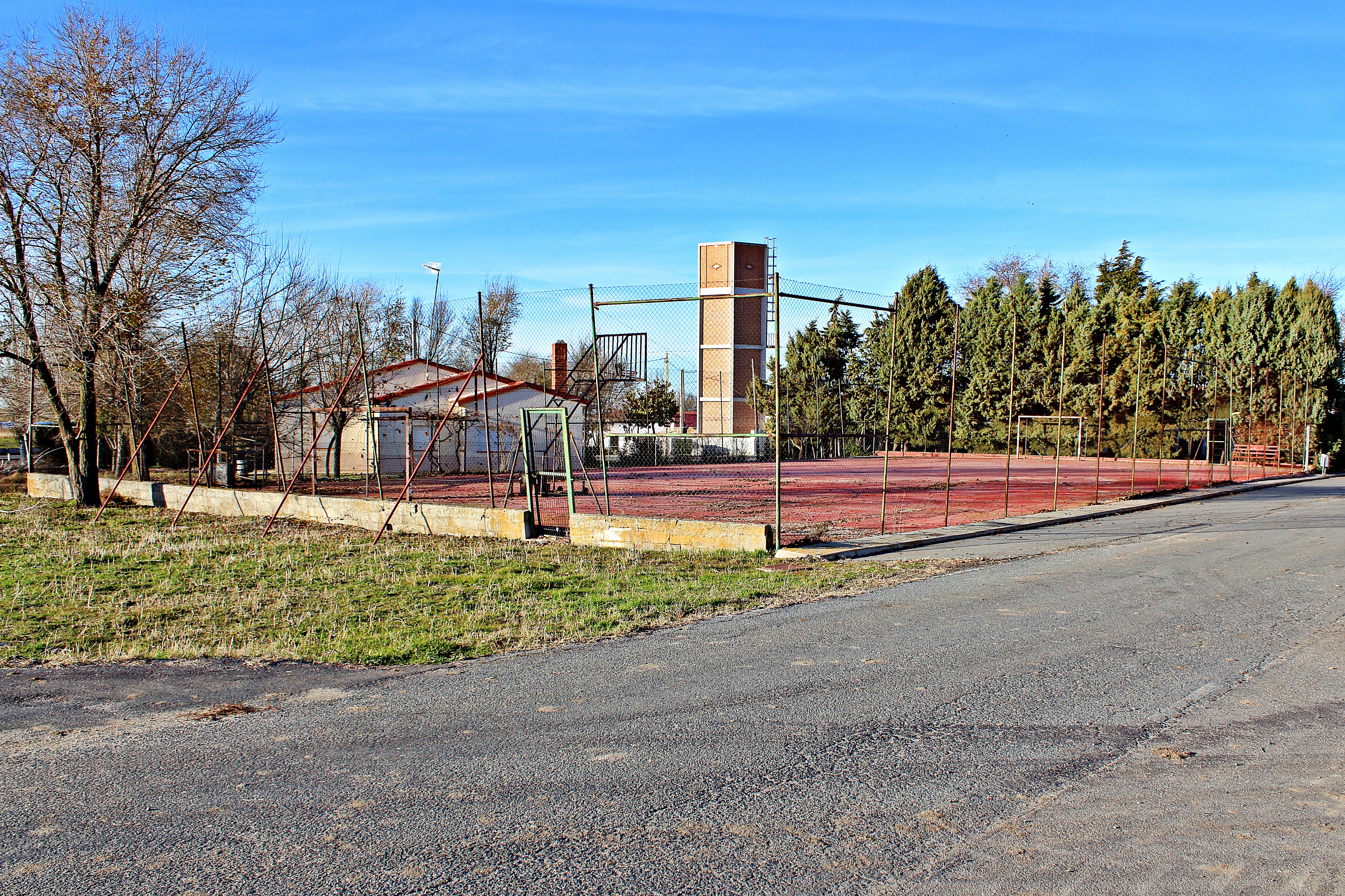 Bernuy-Zapardiel municipio de la comarca de La Morana en la provincia de Ávila